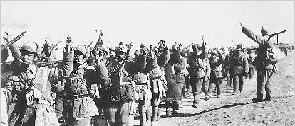 1949年3月，第19兵团指战员在进军太原的行军路上